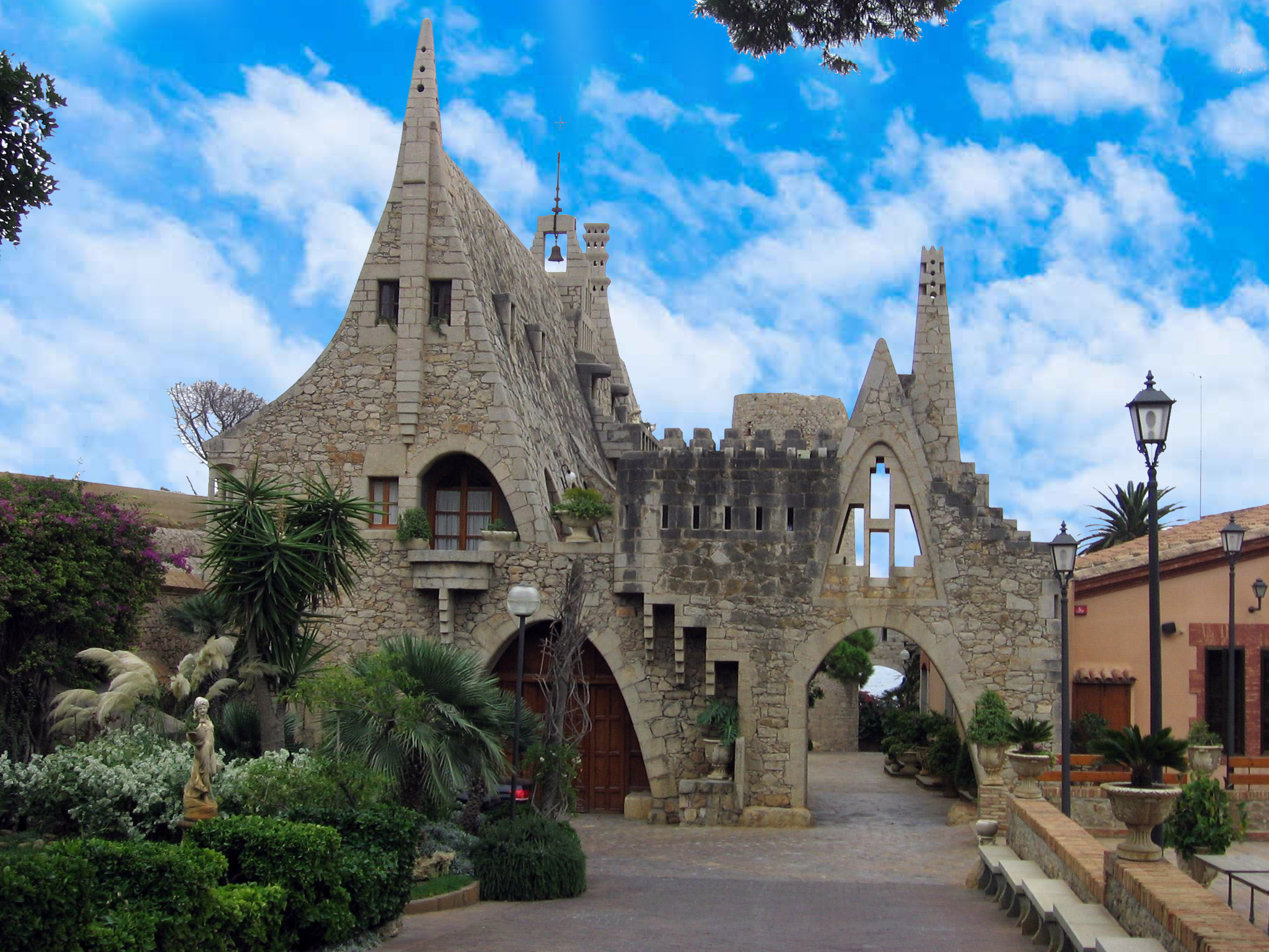 Bodegas Güell (Sitges), de Antoni Gaudí